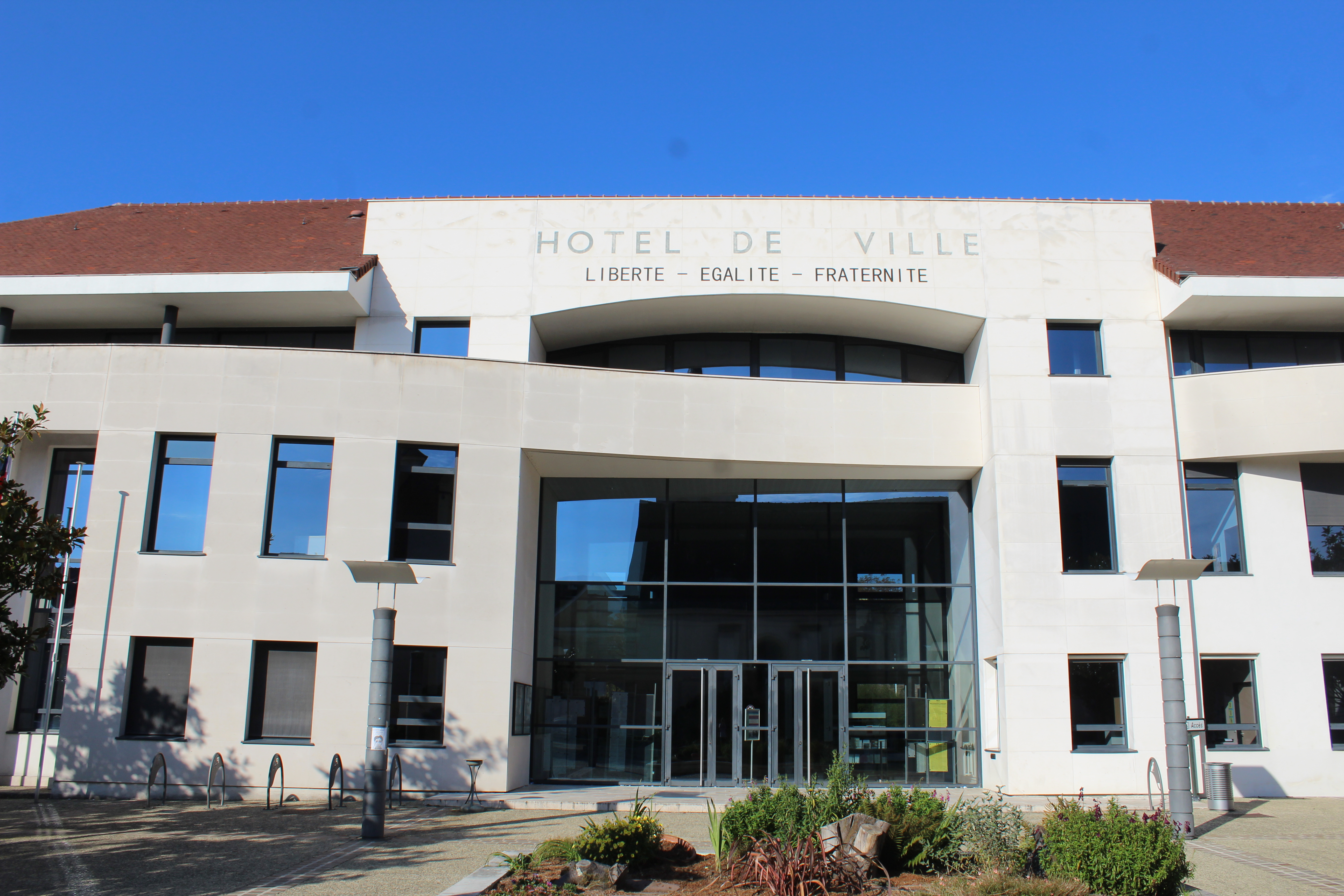 Hôtel de ville de Champs-sur-Marne.